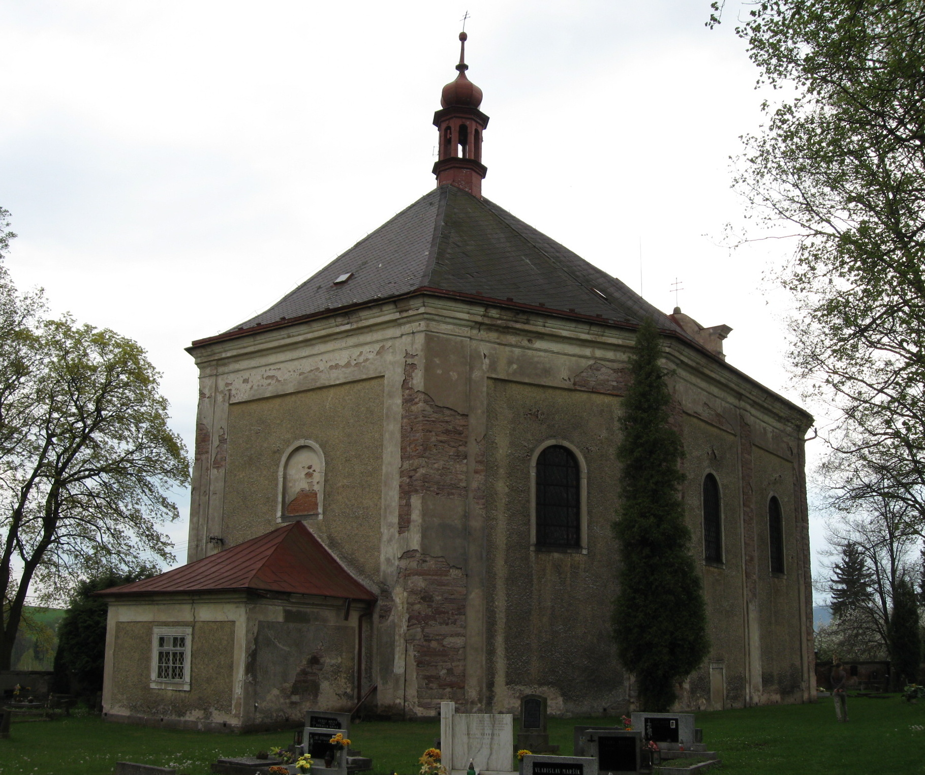 Kostel sv. Jakuba Většího s farou (Ruprechtice), Ruprechtice